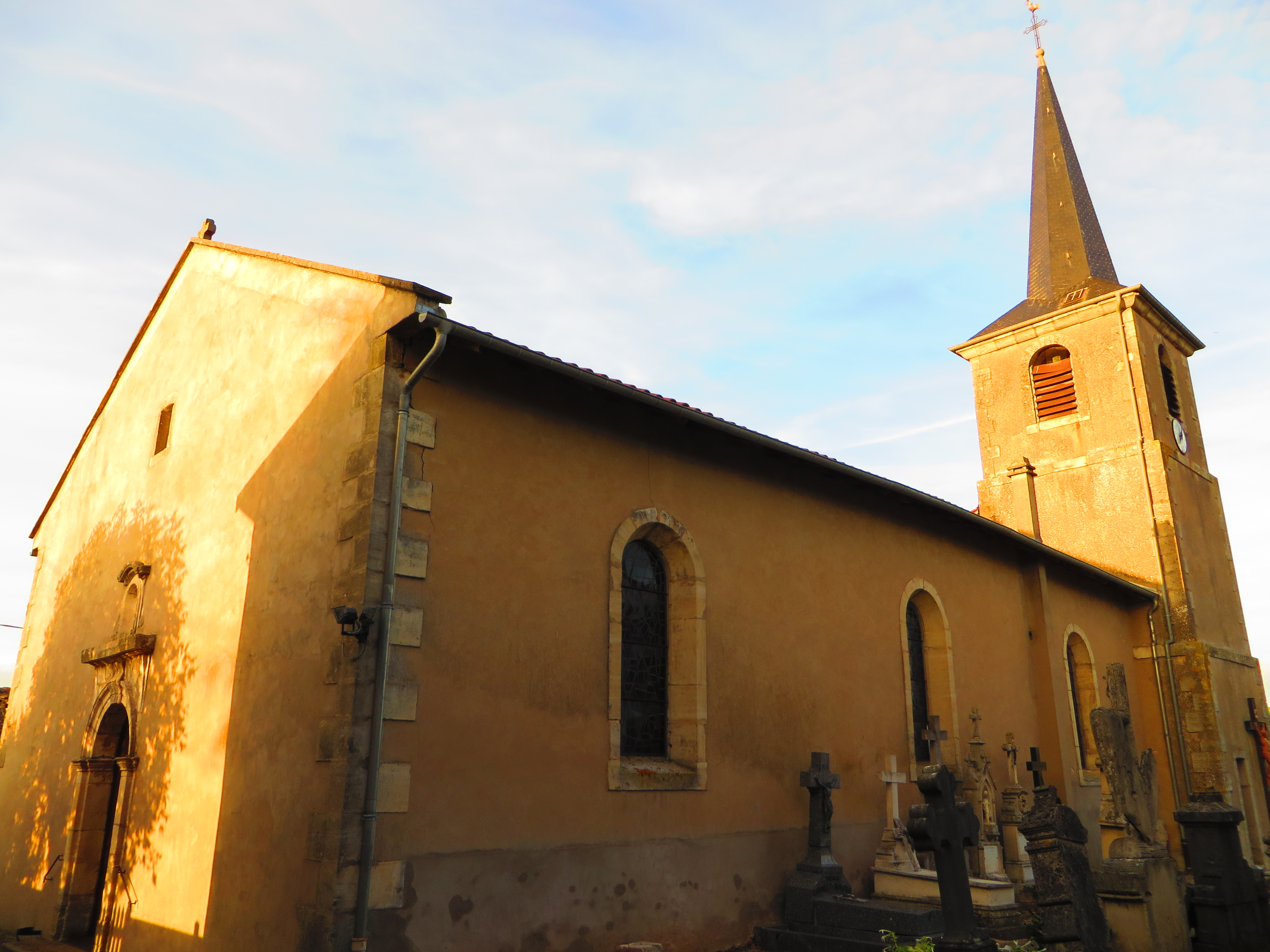 Conthil l'église Saint-Alexis